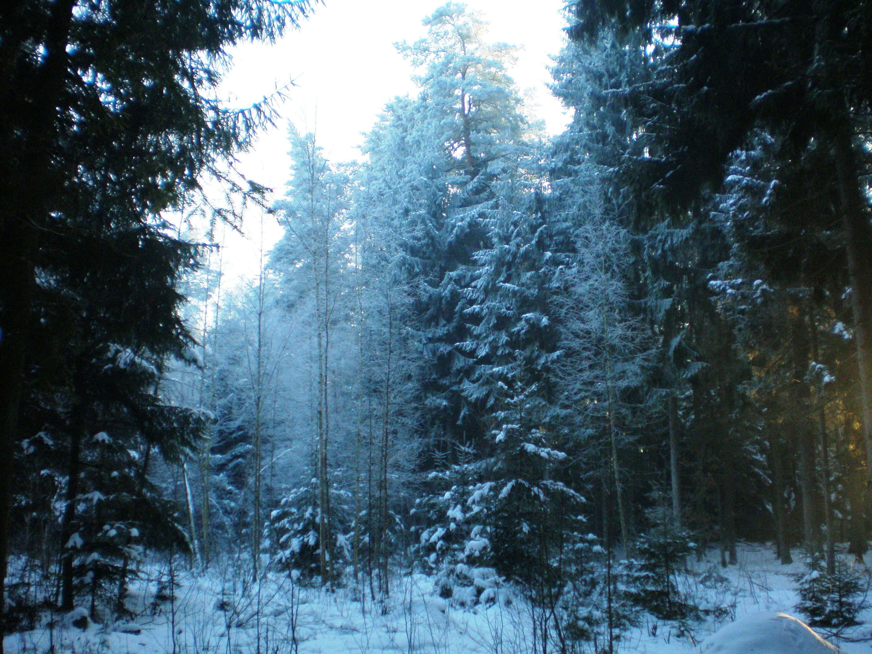 Josvainių miškas, Kėdainių raj.